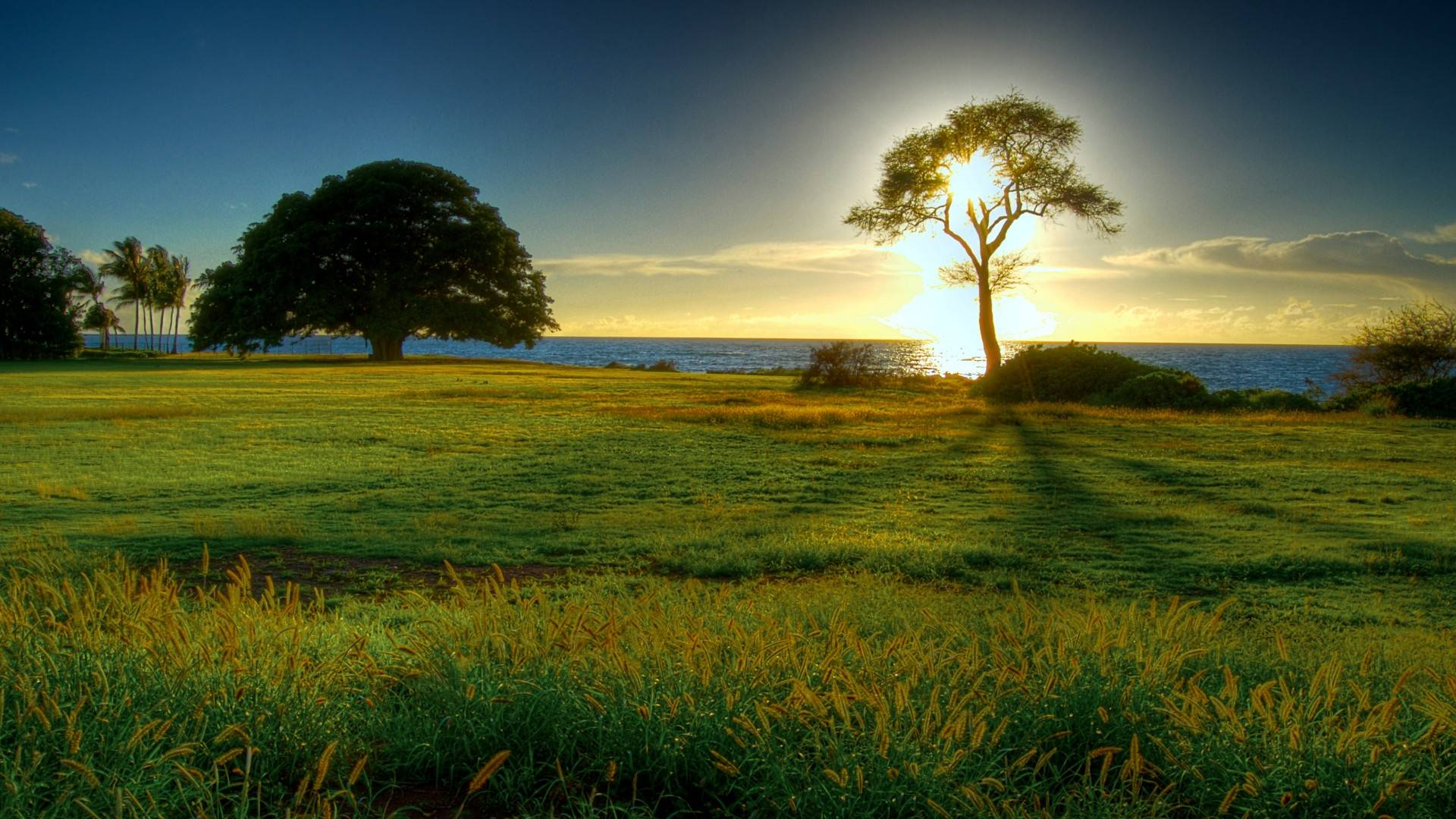 Lokalitet arkeologjik në Sallabajë, Podujevo